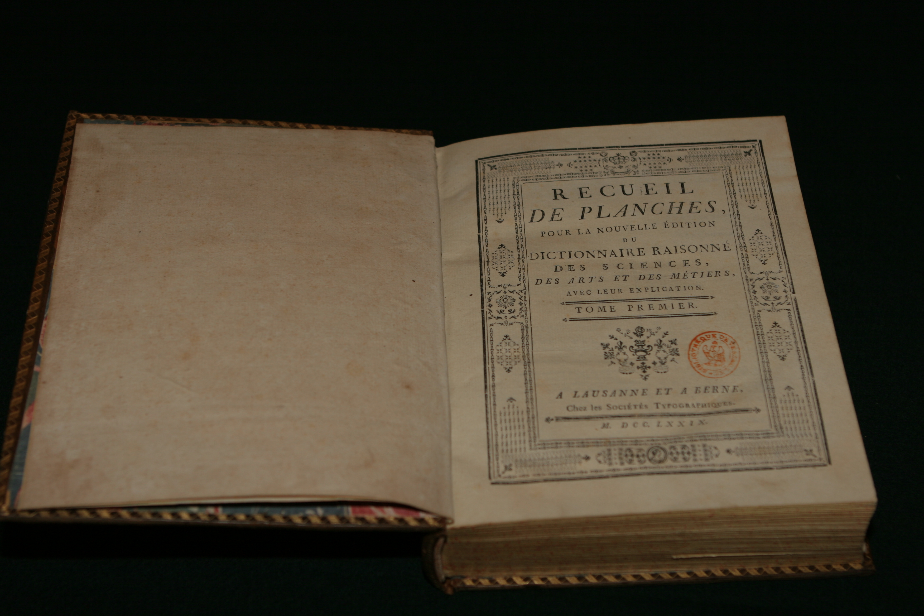 Recueil de planches du tome premier du Dictionnaire raisonné des sciences, des arts et des métiers (couramment appelée Encyclopédie de Diderot et d'Alembert). Exemplaire de la reine Marie-Antoinette provenant de sa bibliothèque personnelle du Petit Trianon. Conservé à la bibliothèque centrale de Versailles (ancien Hôtel des Affaires étrangères et de la Marine)